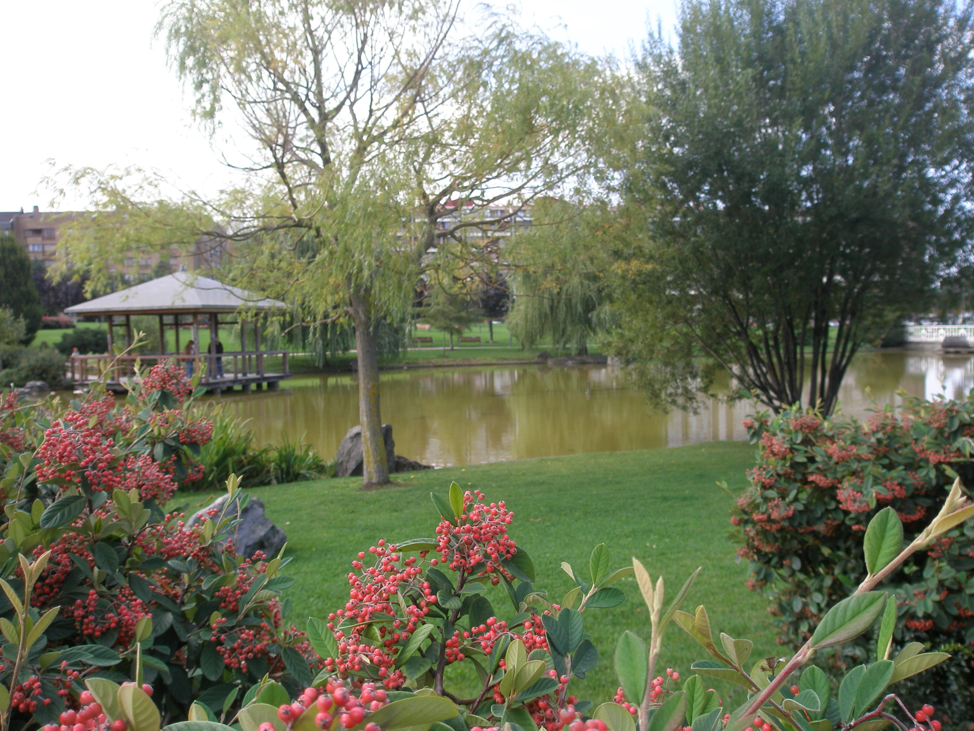 Yamaguchi park, in Pamplona